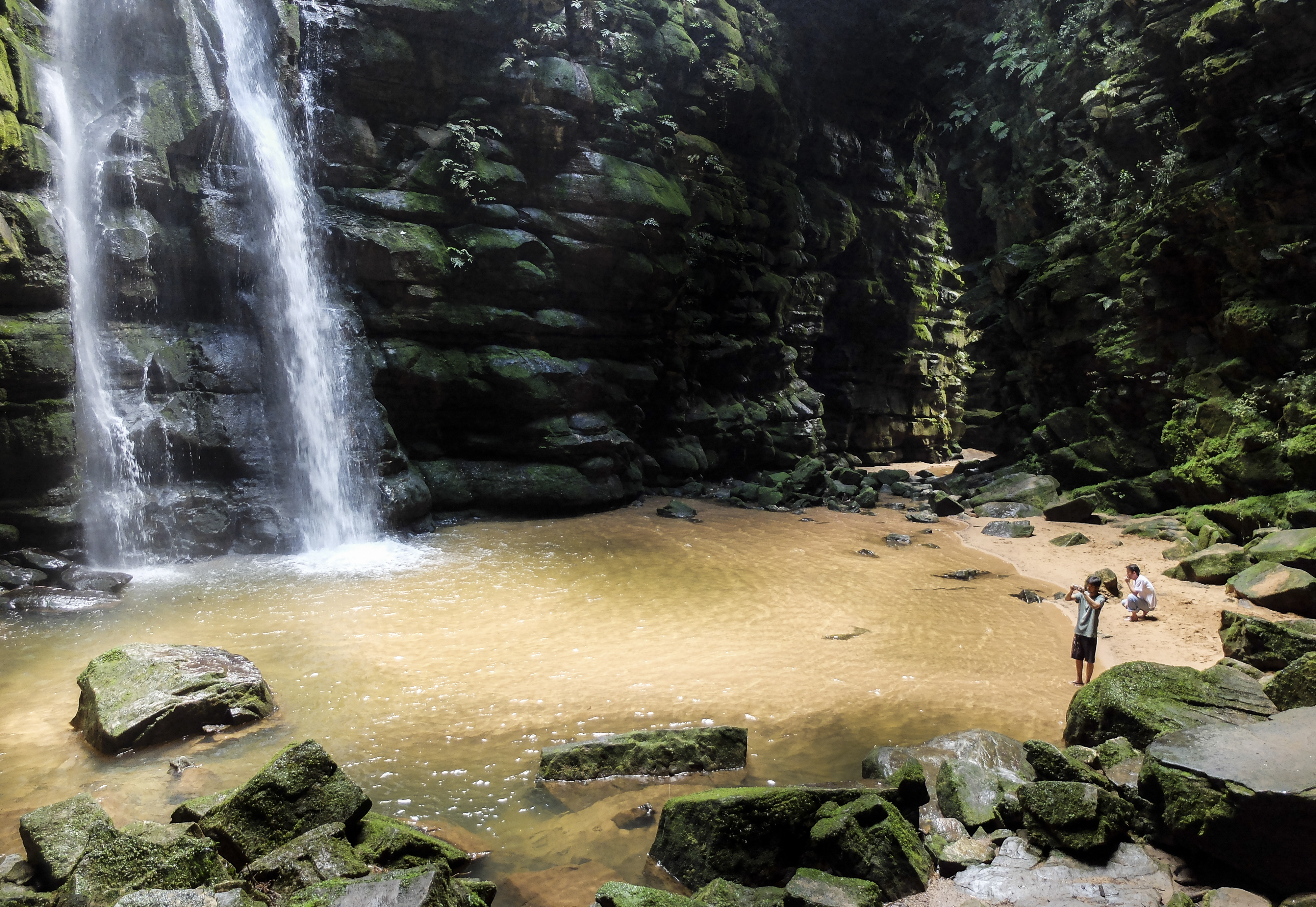 Detalhe do interior..